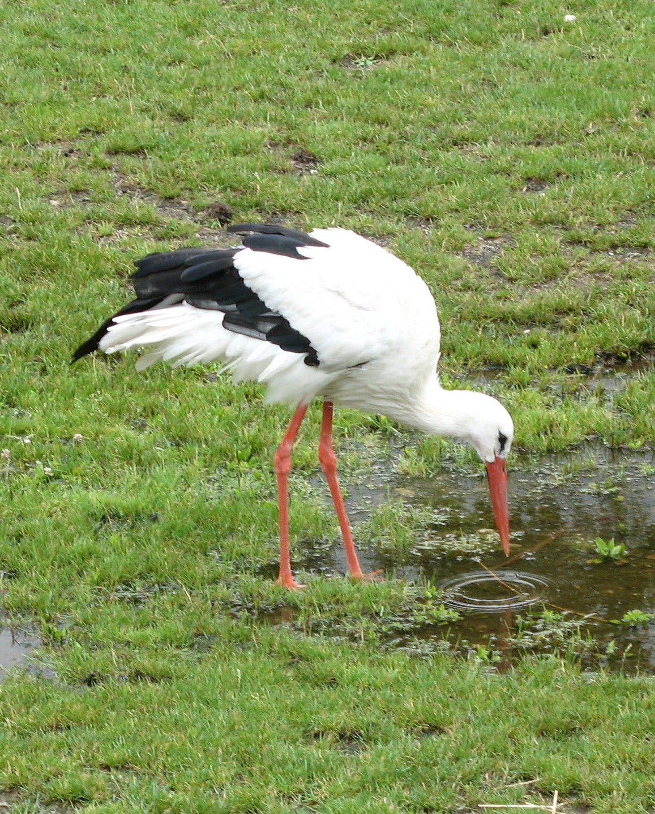 Ciconia ciconia near Leipzig, Saxony, Germany